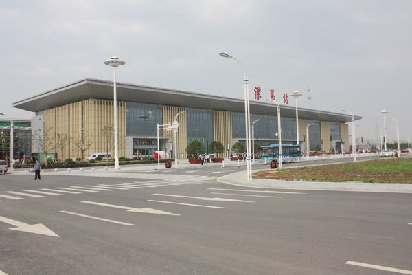 溧阳火车站